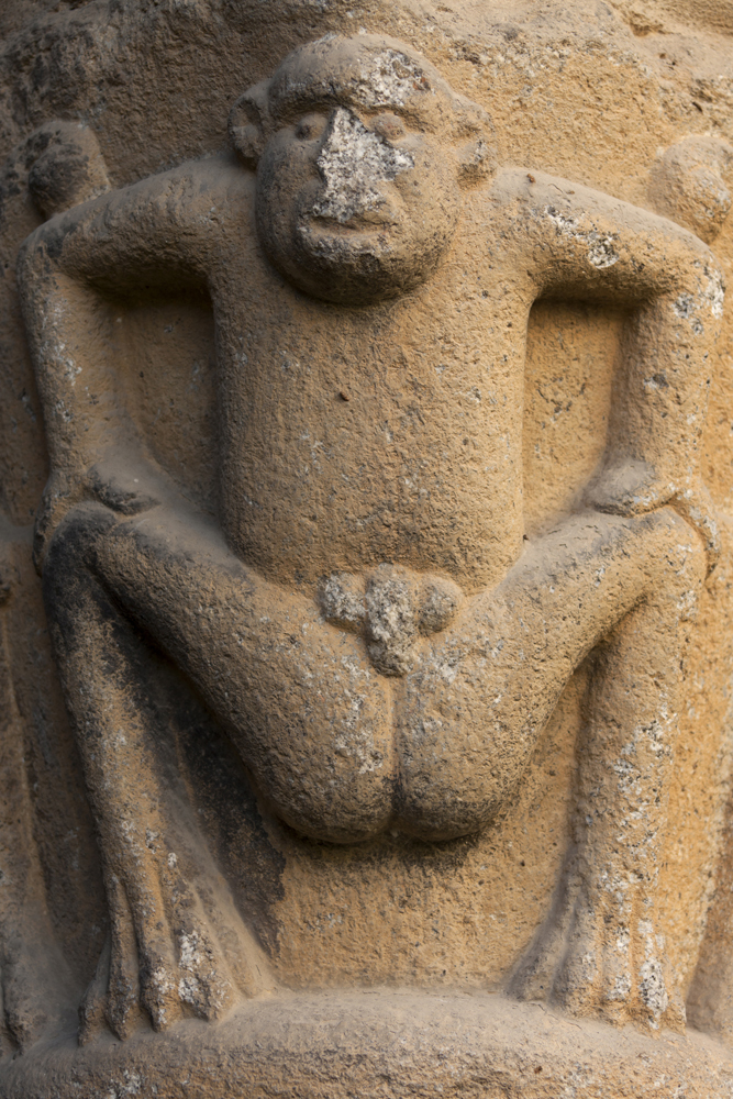 unidentified Spain